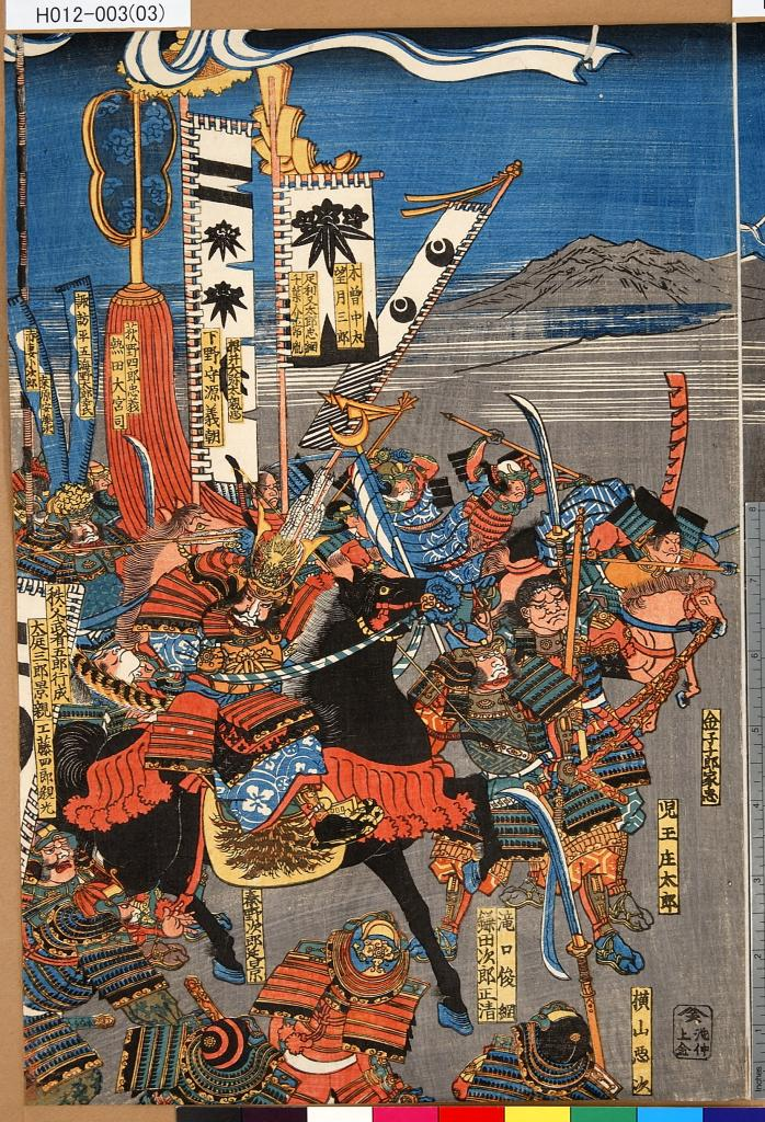 保元軍記白川殿合戦 木曾中太 従軍